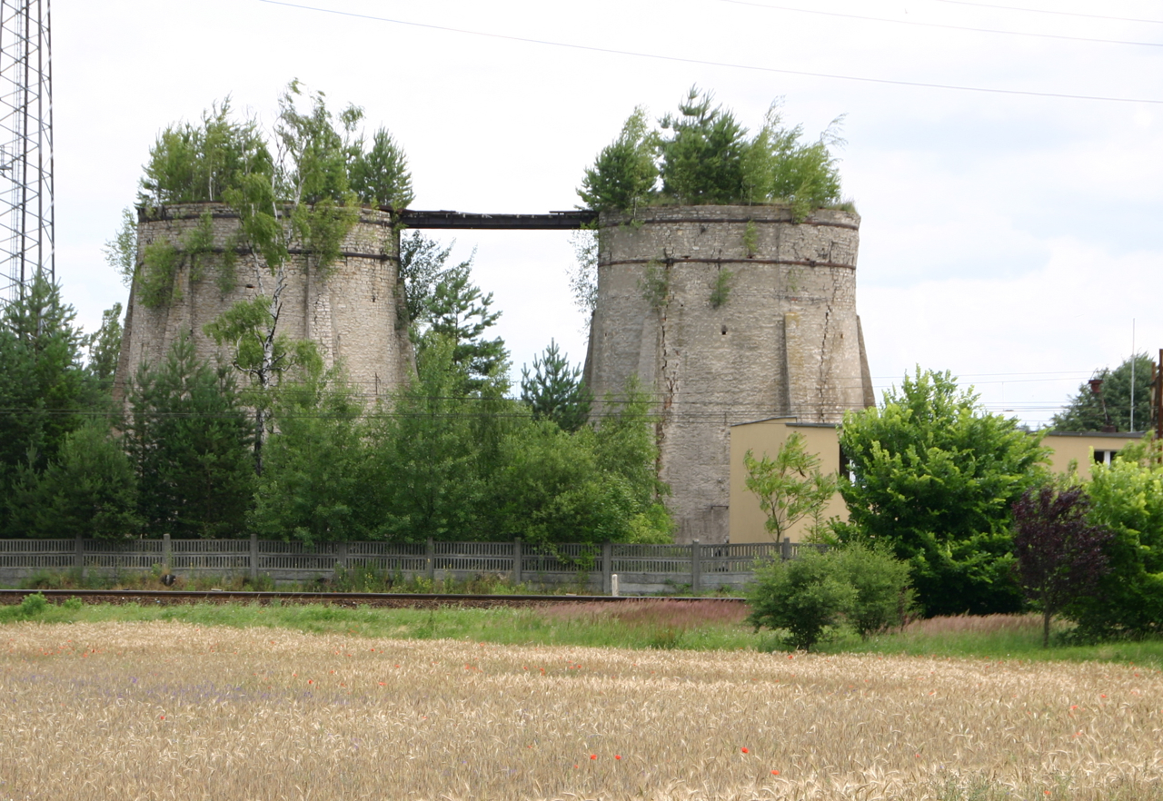 Dwa piece szybowe do wypału wapna w Górażdżach (dodatkowa nazwa w j. niem. Goradze) – wieś w Polsce położona w województwie opolskim, w powiecie krapkowickim, w gminie Gogolin.